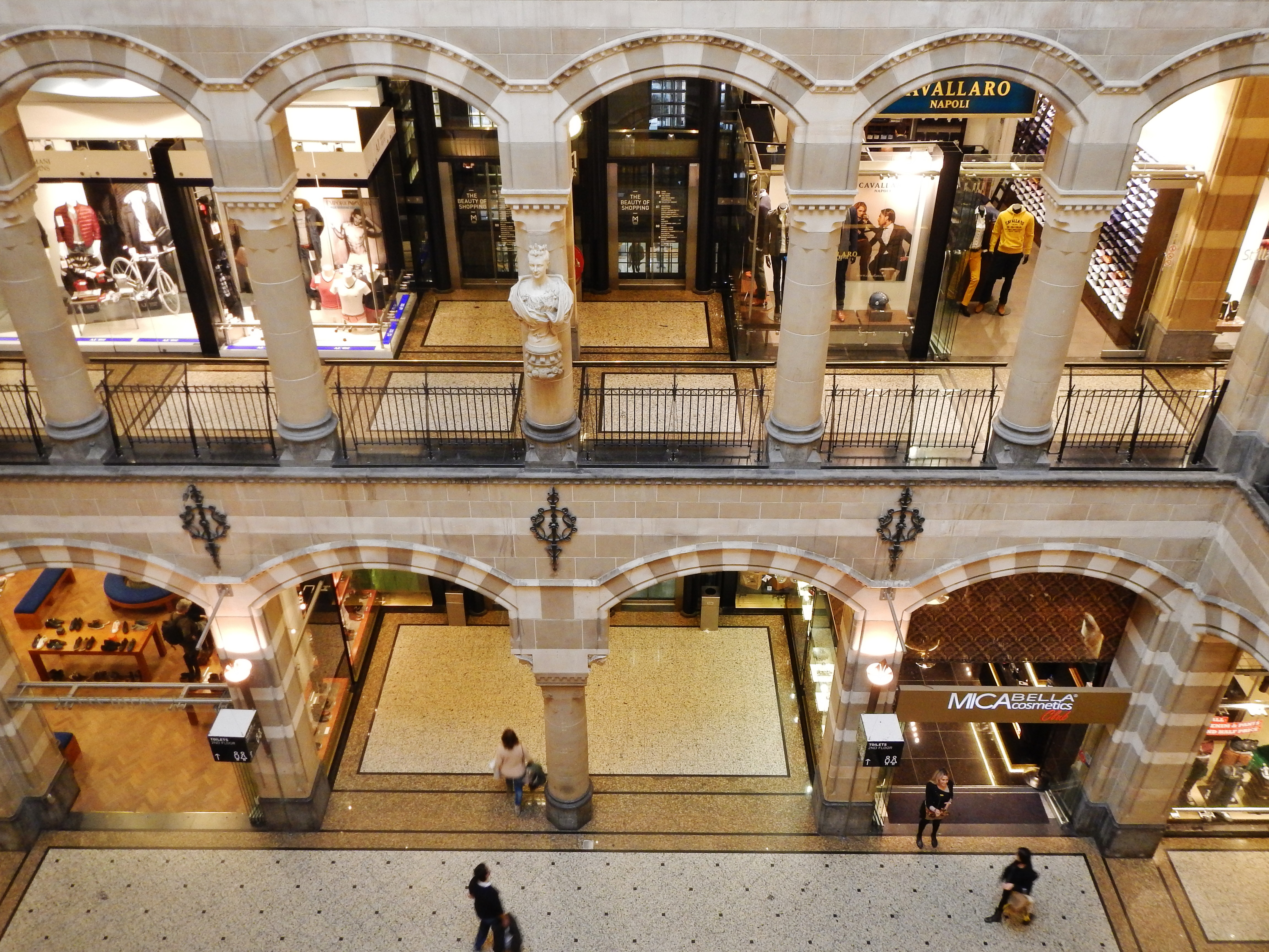 Magna Plaza